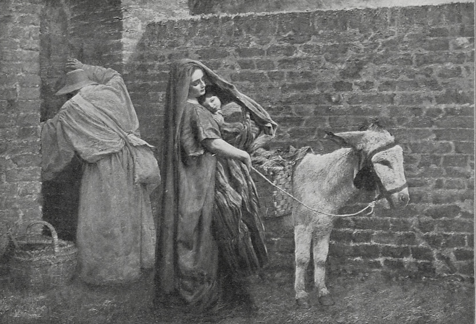 Flucht der Heiligen Familie von Willy Spatz, Deutsch-Nationale Kunstausstellung zu Düsseldorf, 1902